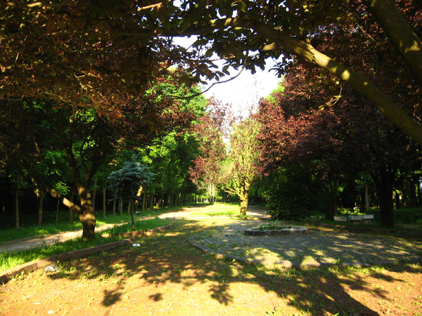 Lviv, park "Sknylivsky"